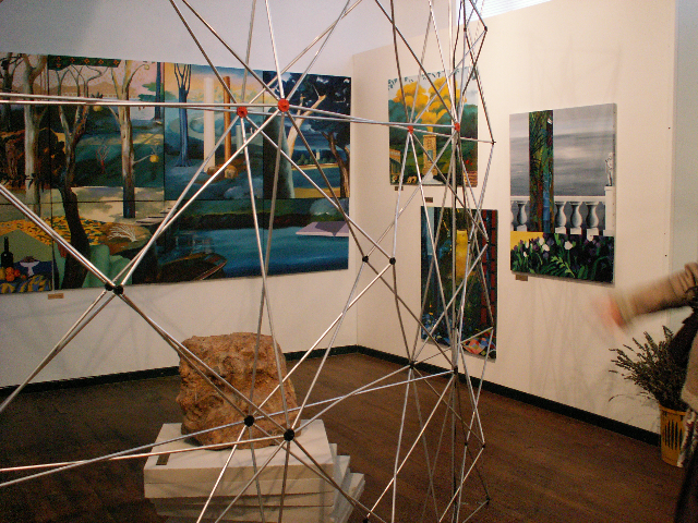 Œuvres de Ksenia Milicevic exposées au musée de peinture de Saint-Frajou.